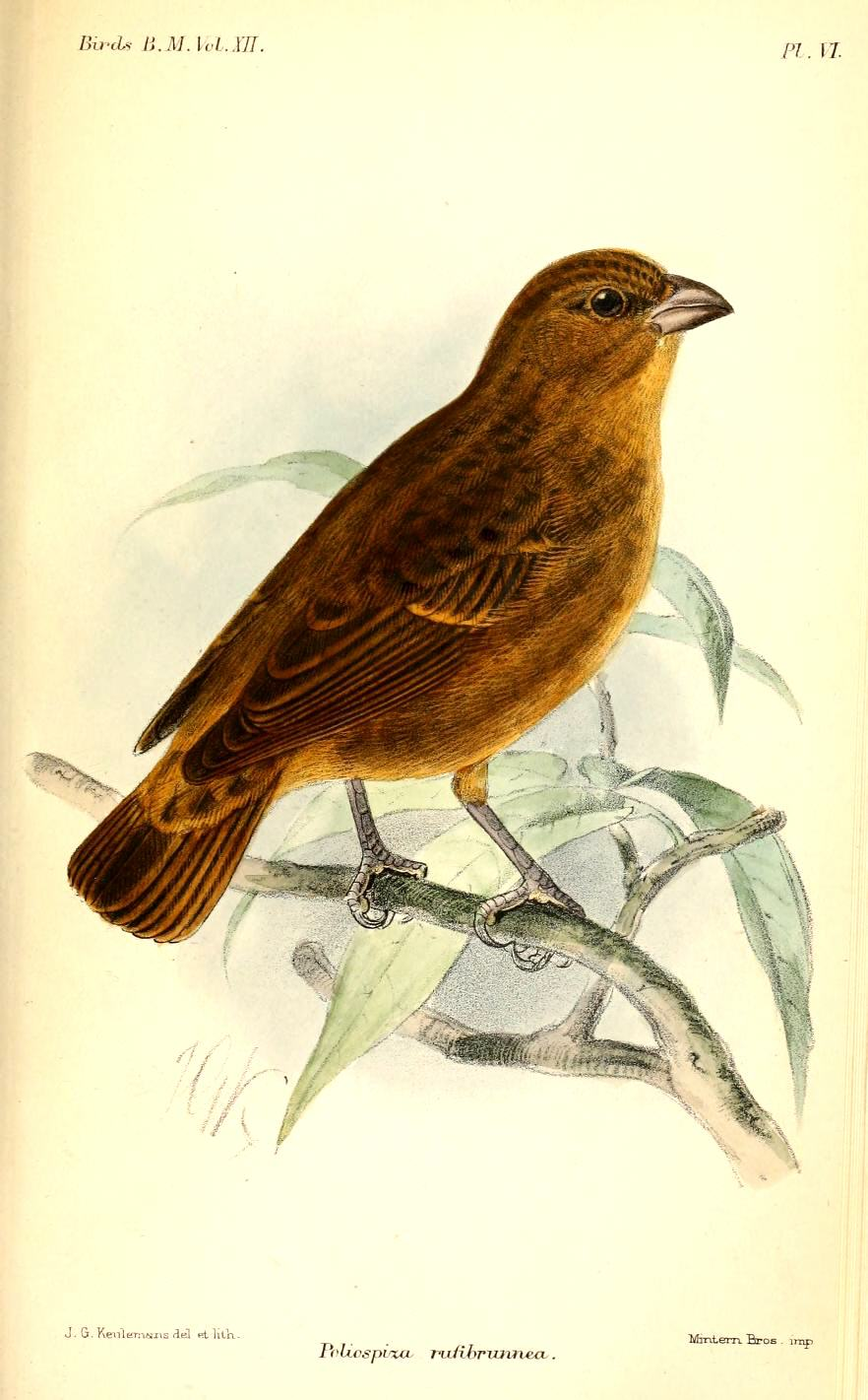 Poliospiza rufibrunnea = Serinus rufobrunneus, Príncipe Seedeater